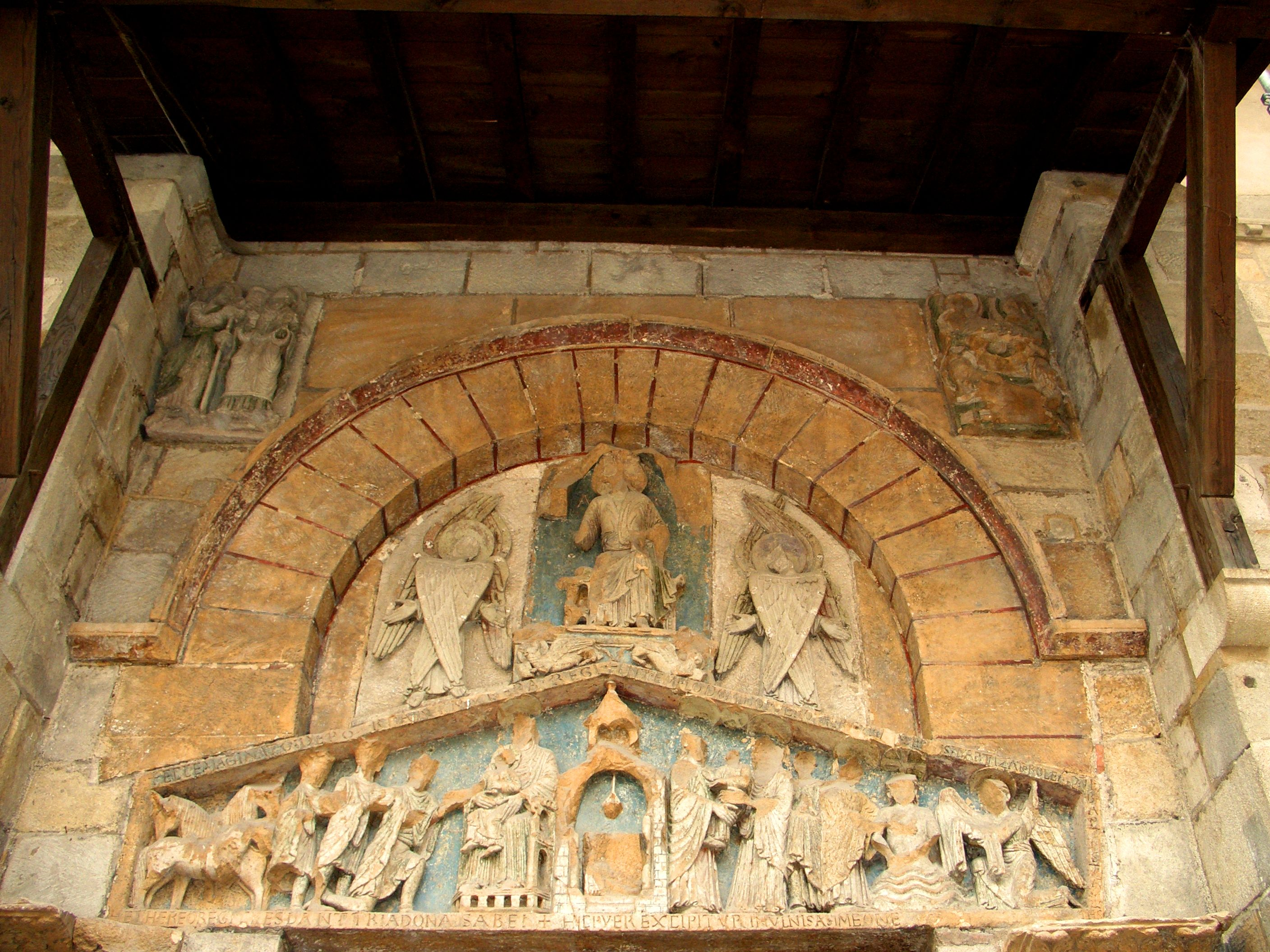 Clermont-Ferrand - Basílica de Nostra Senyora del Port - Timpà